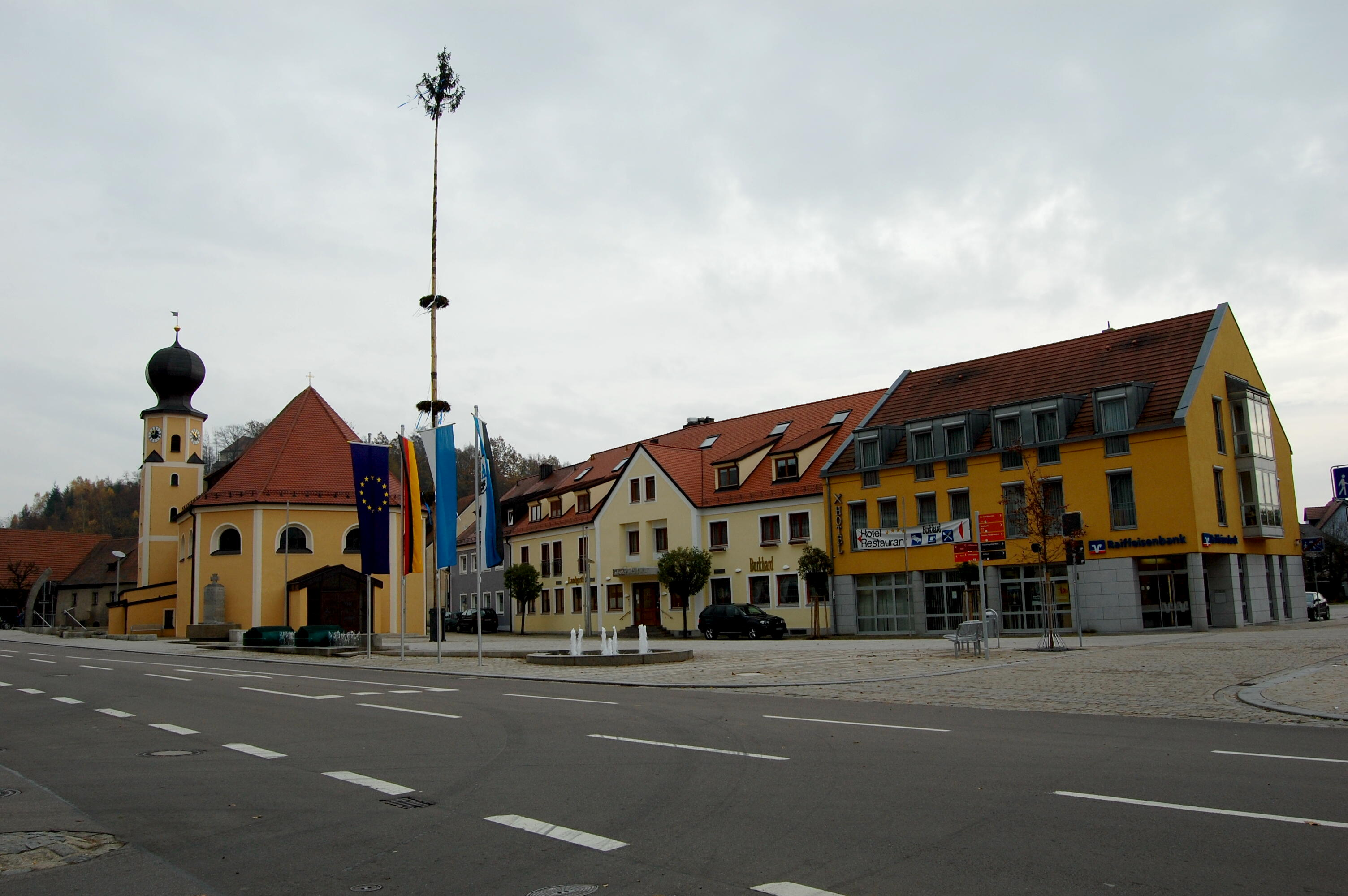 Wernberg-Köblitz, Marktplatz mit Pfarrkirche